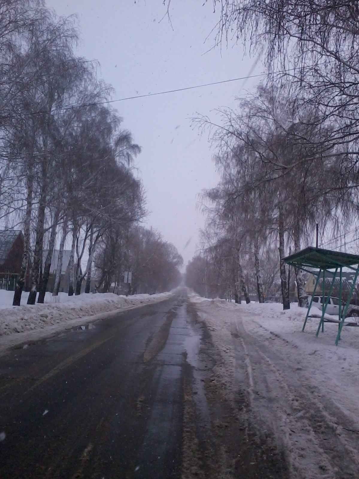 Главная дорога в Кузминском